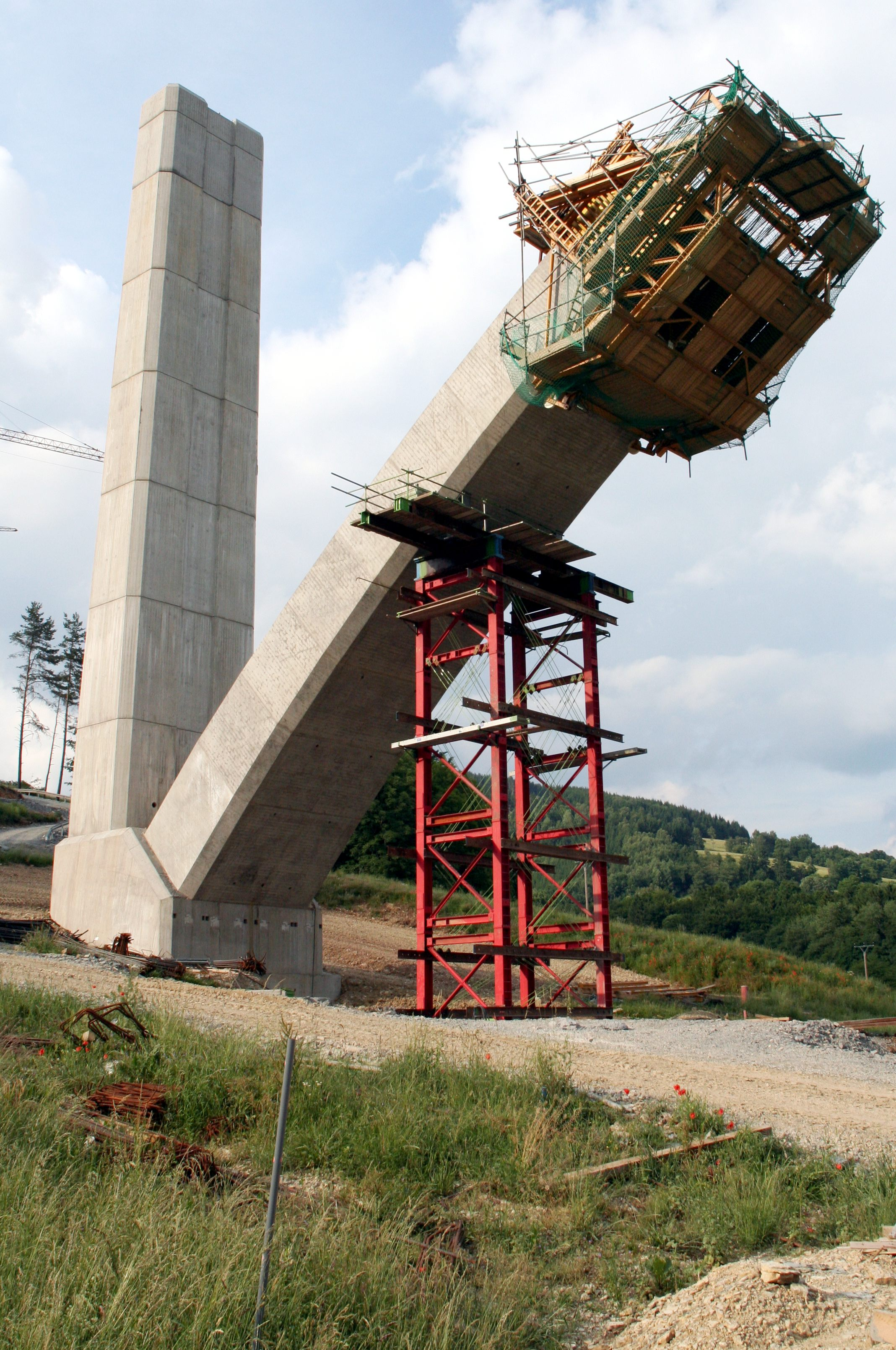 Talbrücke Truckenthal, nördlicher Bogenabschnitt